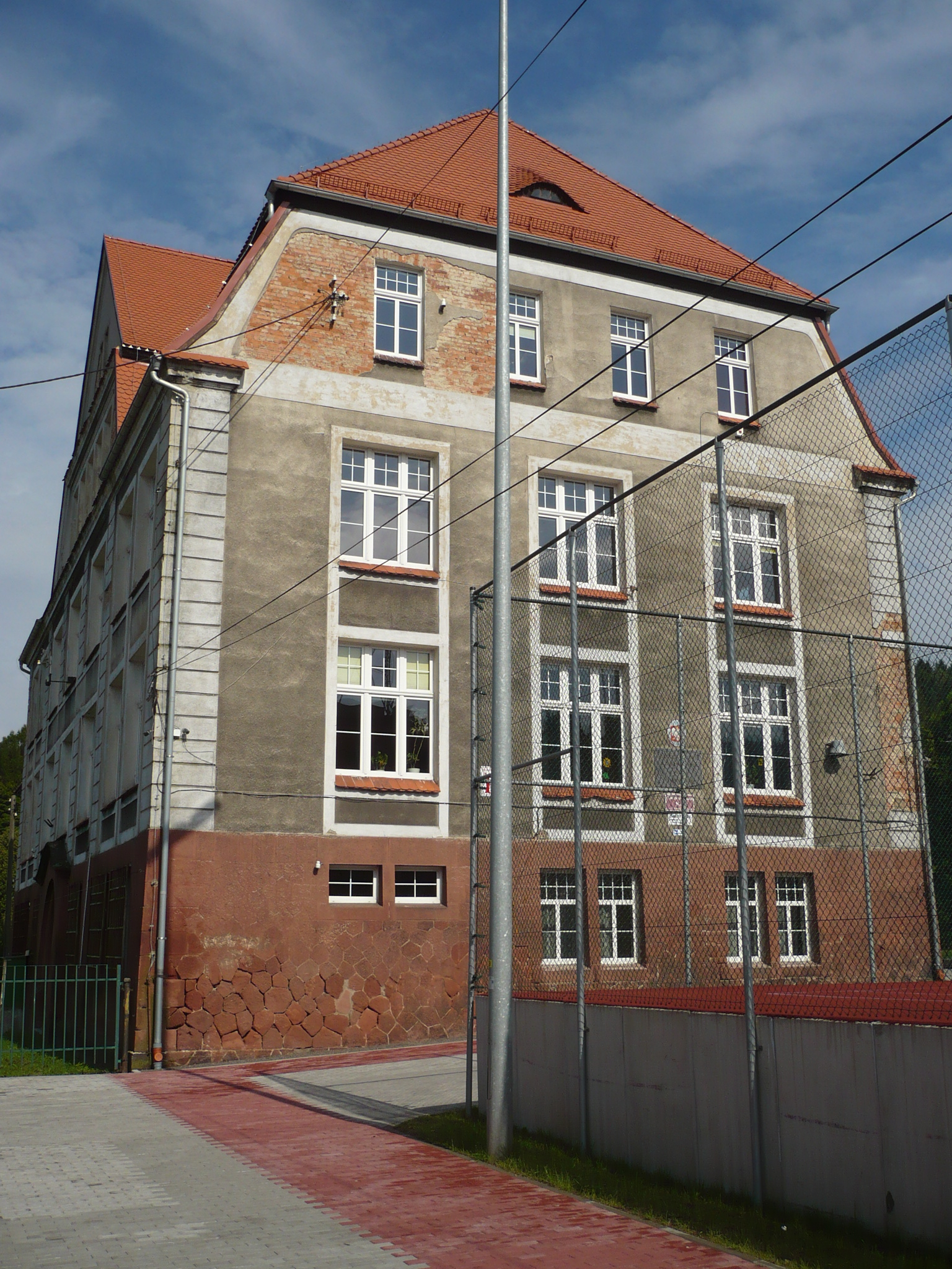 Nowa Ruda. Gimnazjum Nr 1